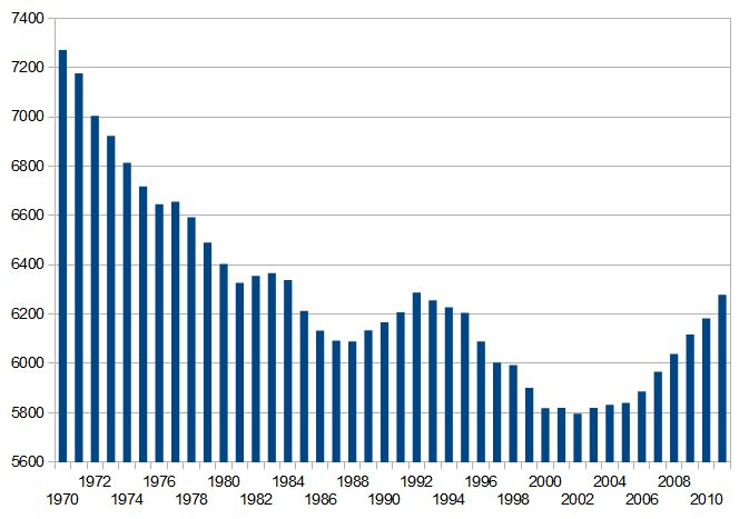 Kittilän asukasluvun kehittyminen vuosina 1970-2011